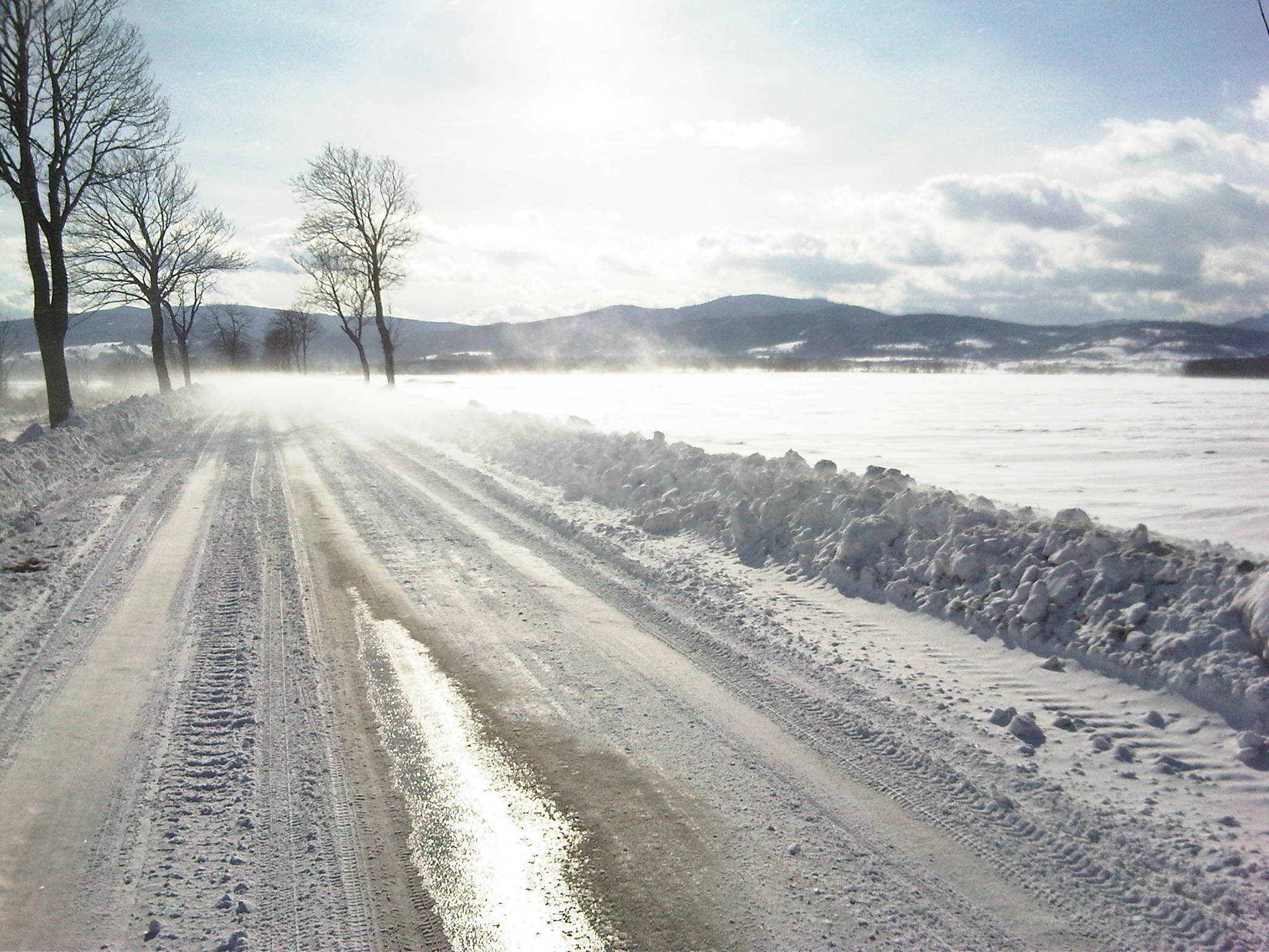 Droga nr 390 na odcinku pomiędzy miejscowoścami Sosnowa i Płonica.